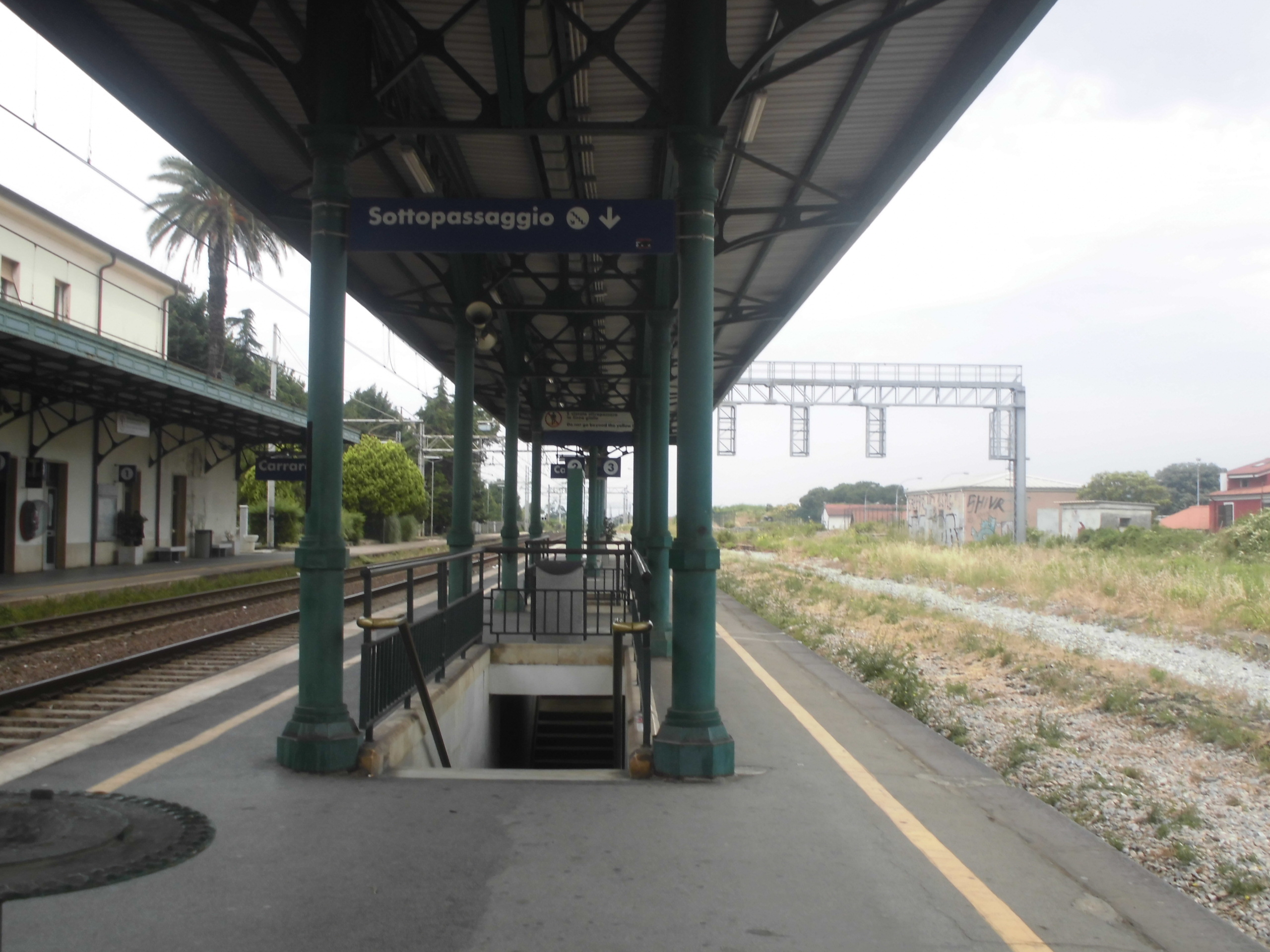 Veduta della 2ª banchina che serve il 2° binario e che una volta serviva anche il 3° binario. Si può notare l'ex ponte dei segnali luminosi e i due edifici annessi ed esso.